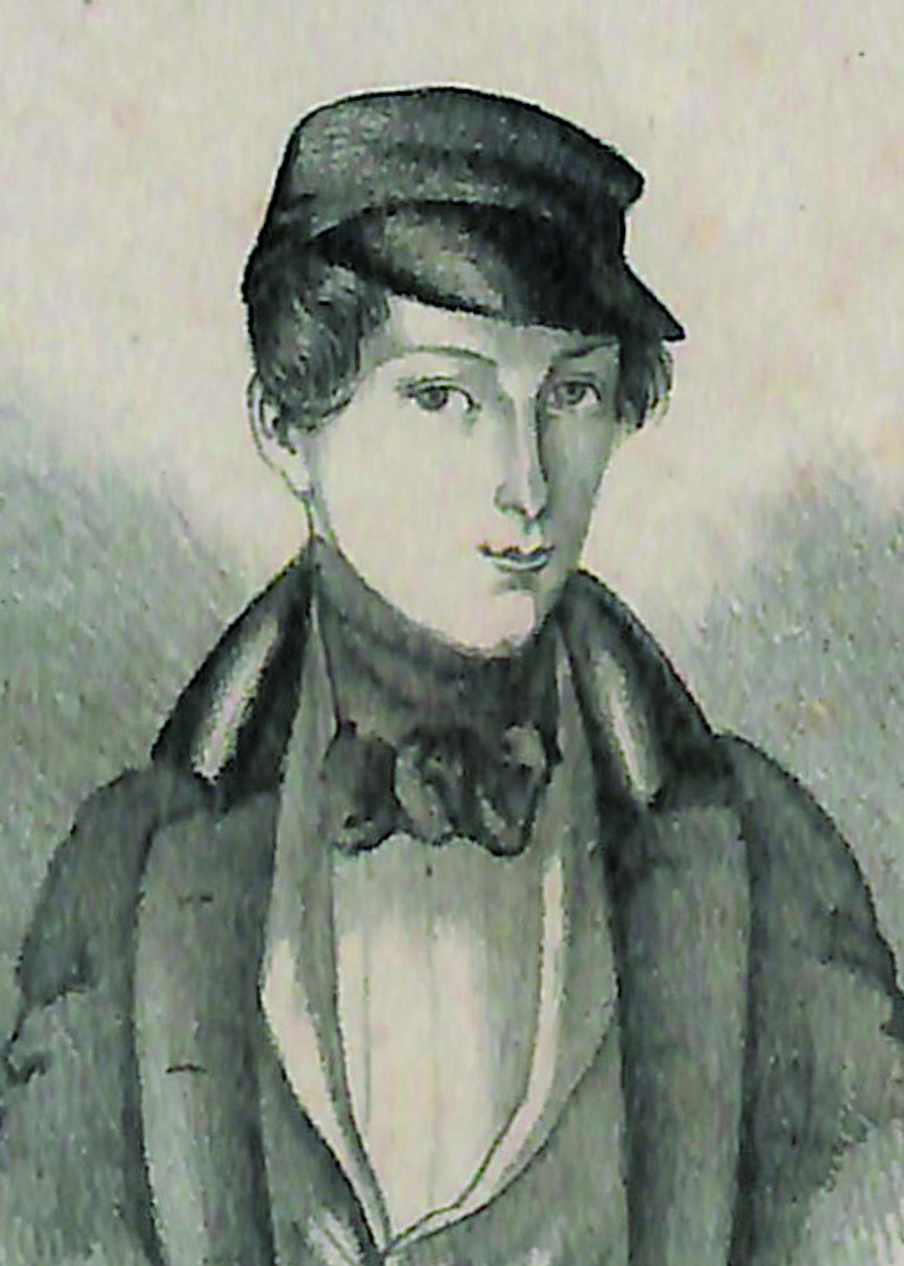 Porträtlithographie des jungen Alexander von Bethmann als Renonce der Rhenania Bonn